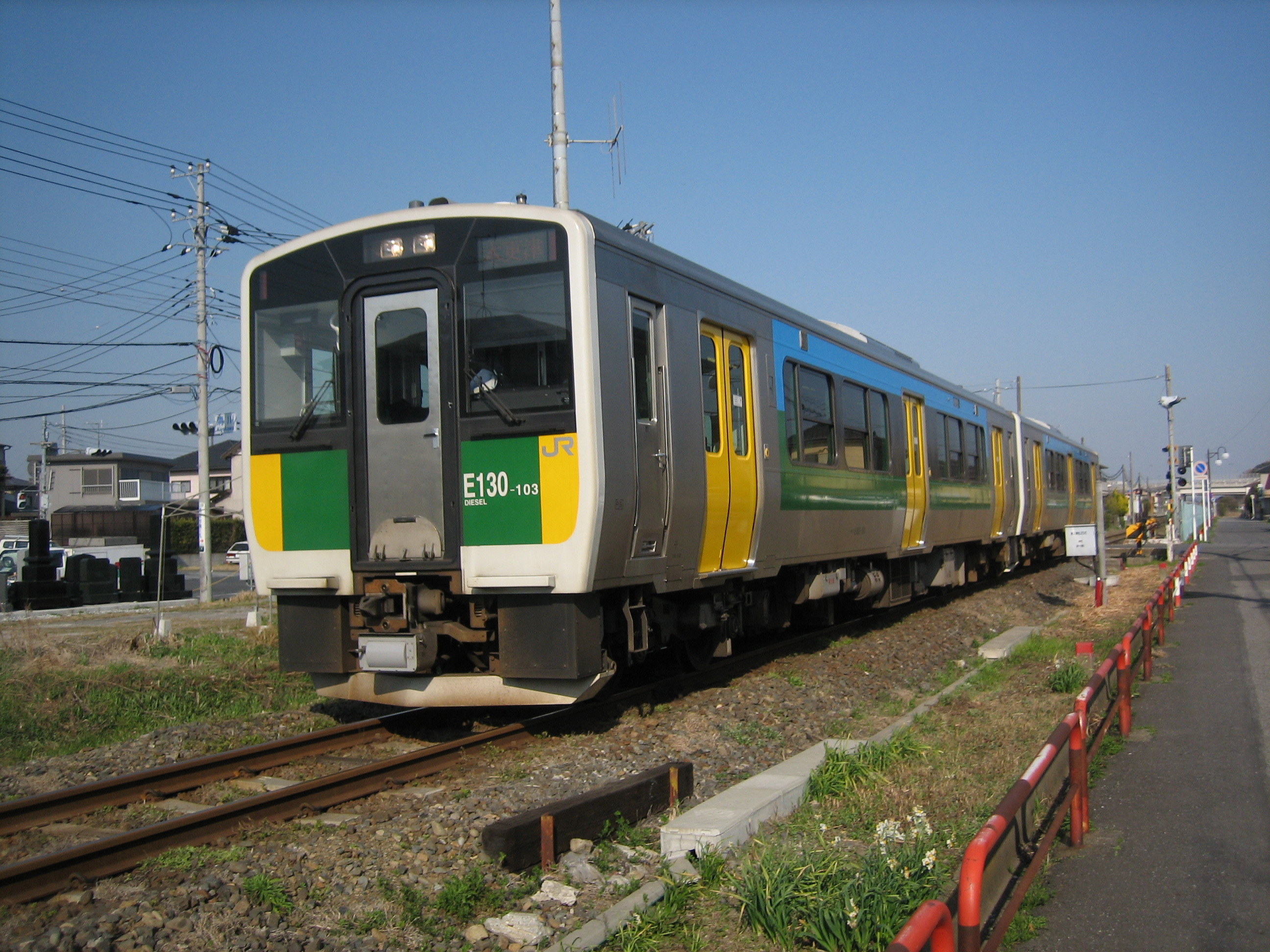 上総清川駅を発車したキハE130系